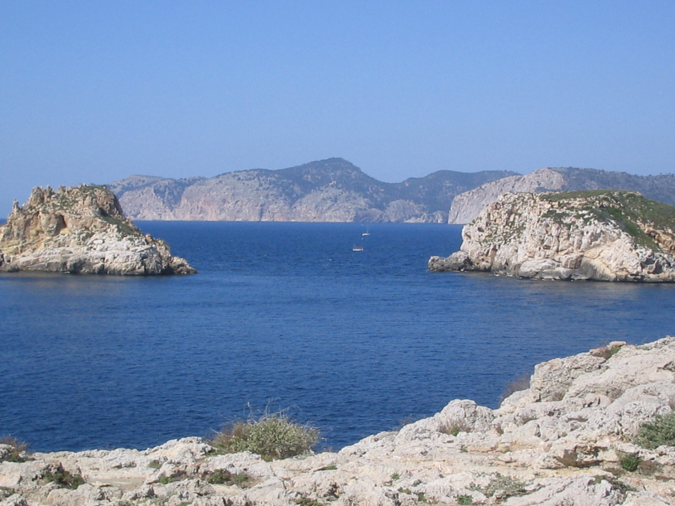 Malgrats islands in Santa Ponsa Mallorca.